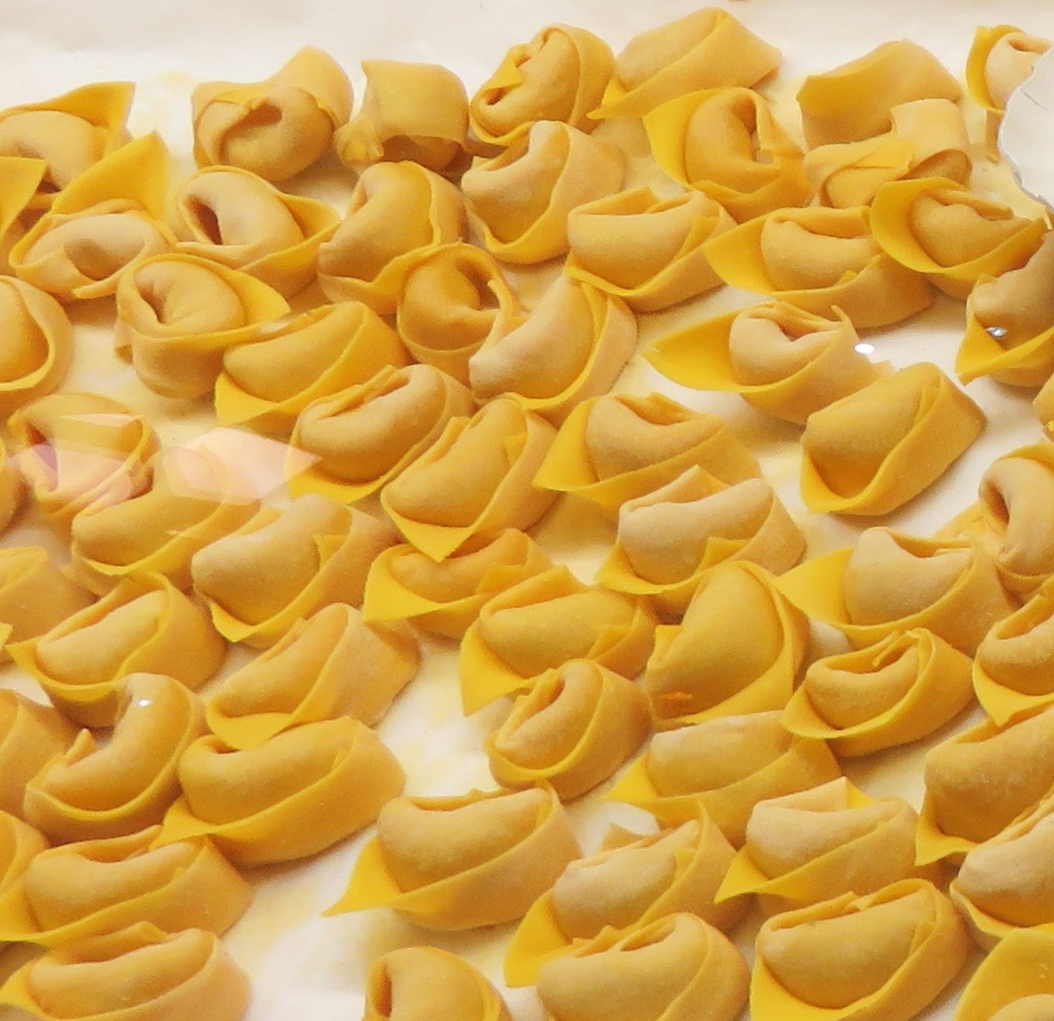 pasta ripiena tipica tradizionale ferrarese